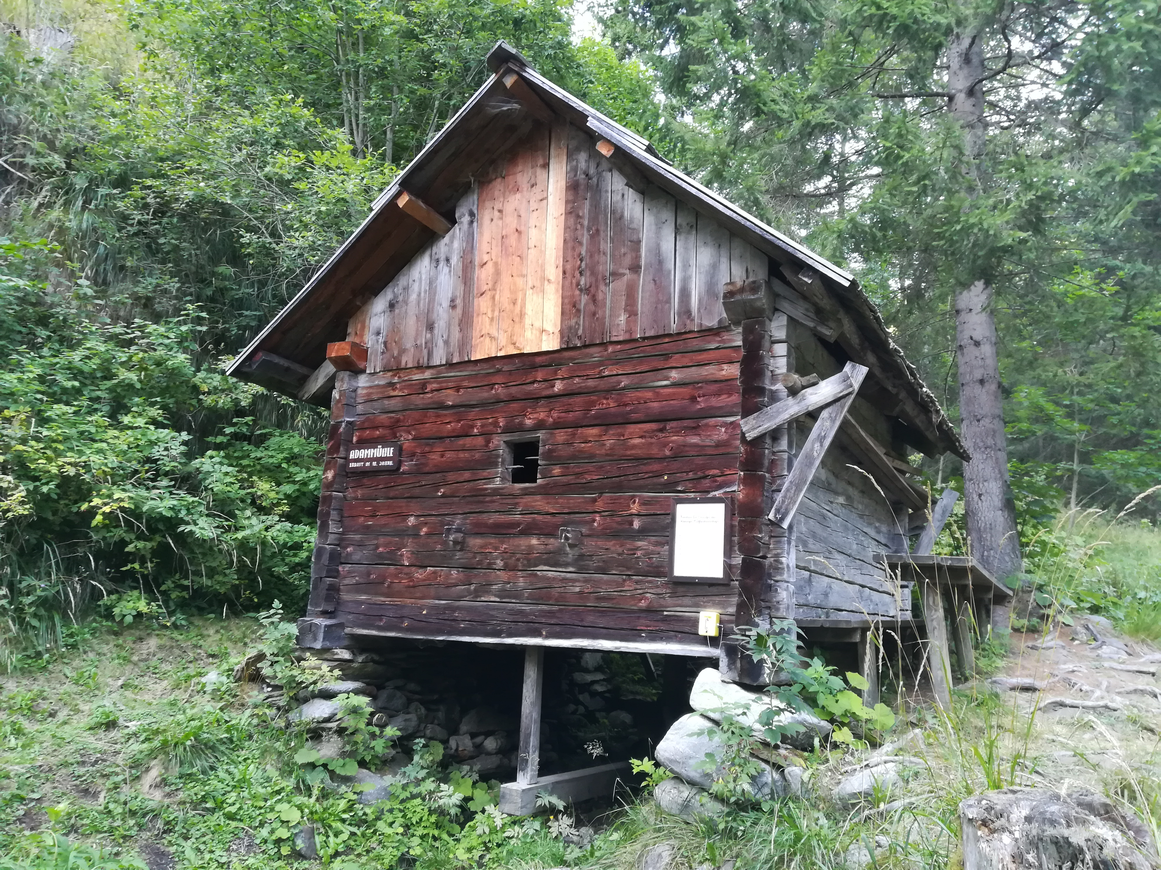 Adammühle in Kaning bzw. am Kaninger Mühlenwanderweg. Um 1800 erbaut.